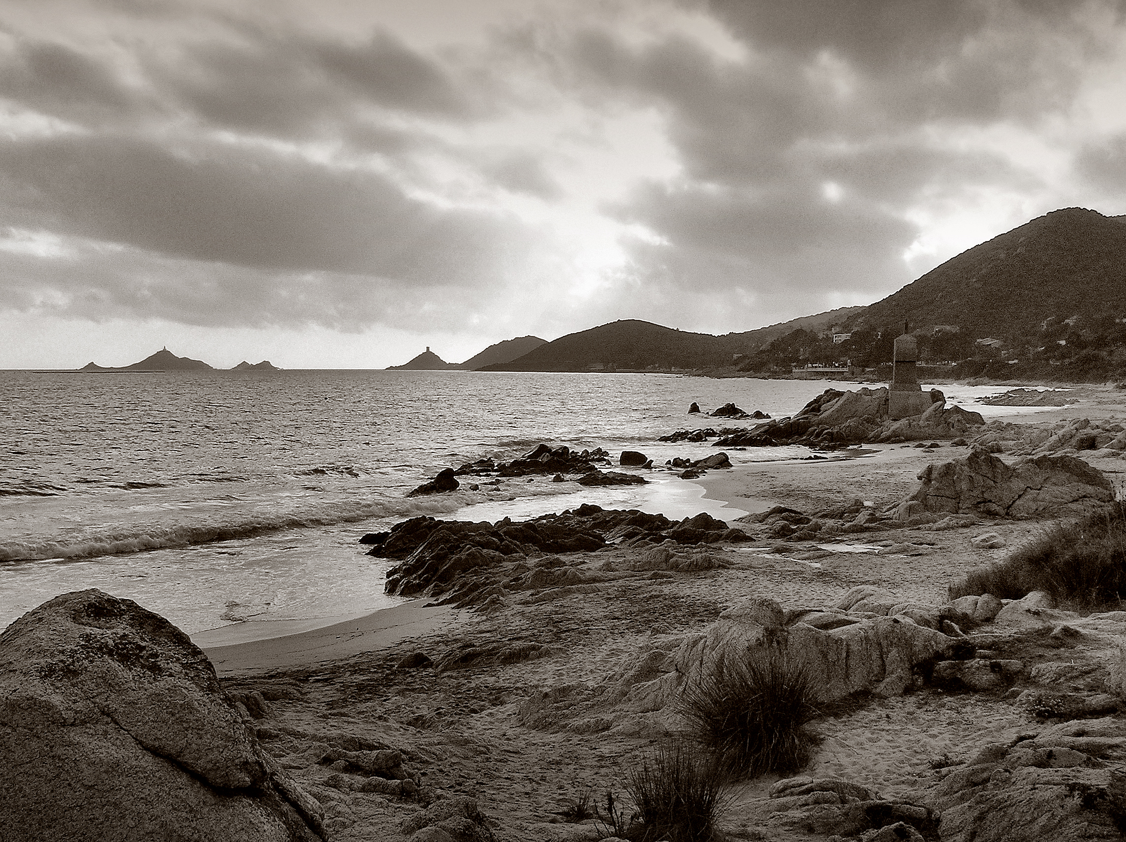 Ajaccio (Corse) - Borne de la Terre Sacrée au lieu-dit Vignola, sur la route des Sanguinaires, érigée en 1933 en mémoire aux soldats morts durant la guerre de 1914-1918